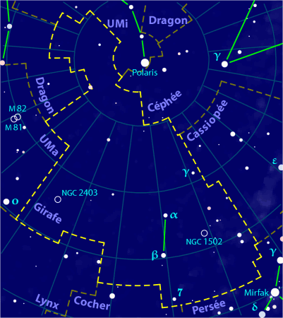 Carte pour la constellation Girafe Produite à l'aide du logiciel PP3